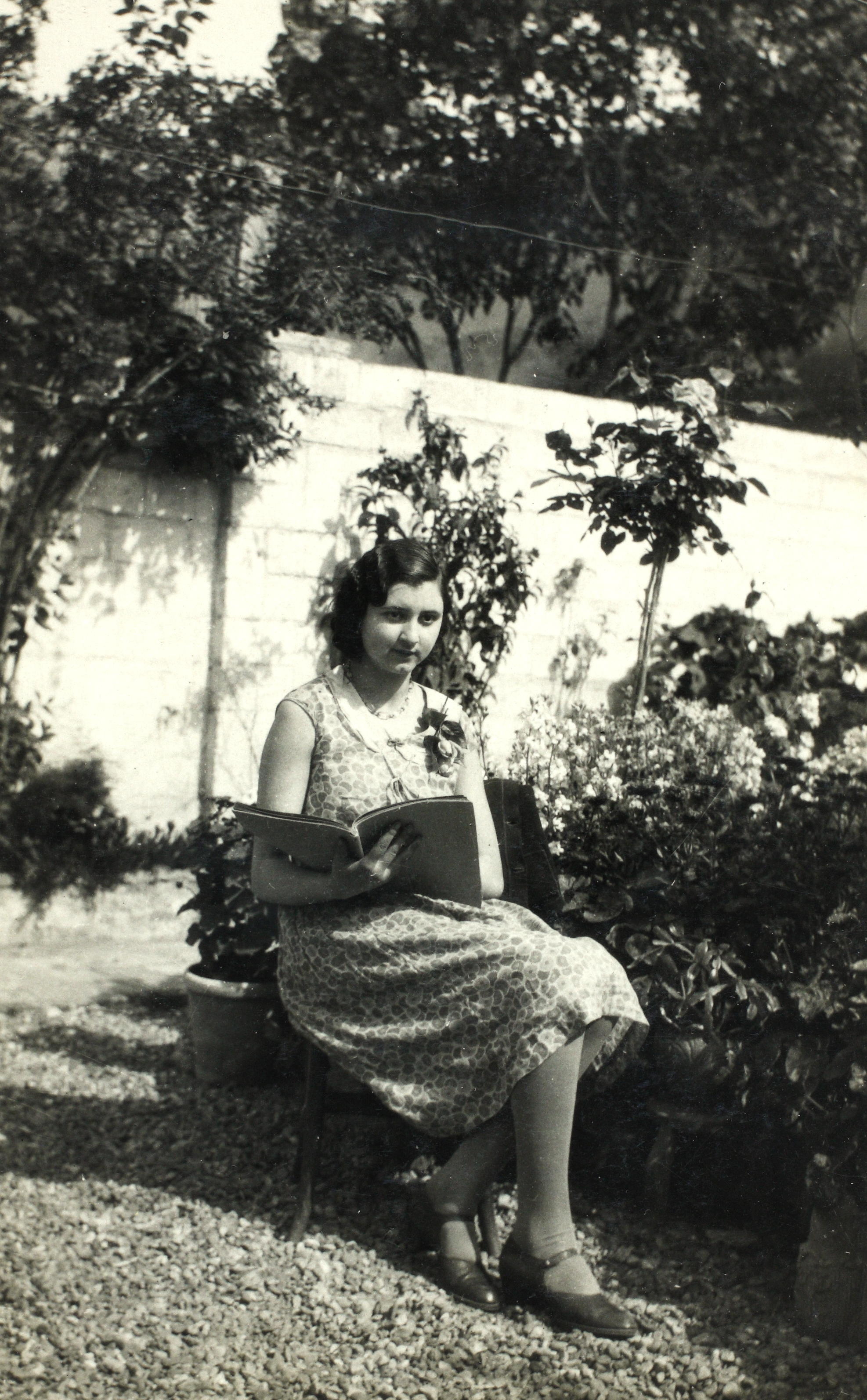 Magda Lladó Fuster. Sabadell, 1929 (Arxiu Històric de Sabadell).